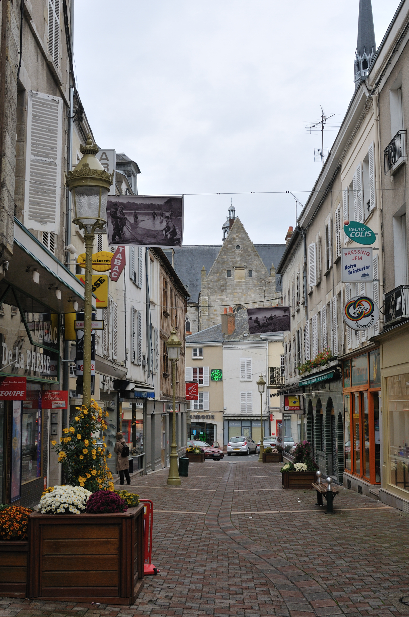 Rue de la Couronne, Pithiviers, Loiret, France